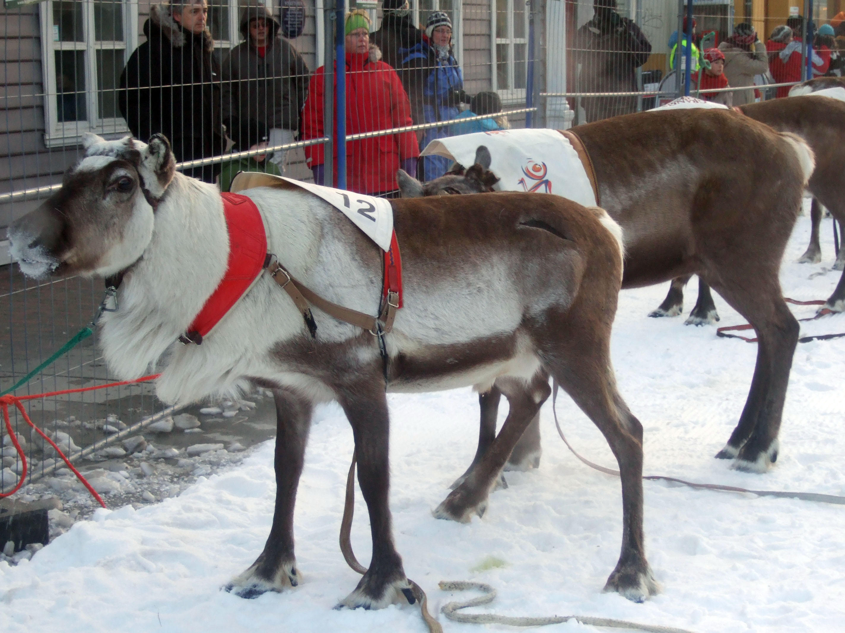 Vinnerreinsdyret i NM i reinkappkjøring i Tromsø 2009